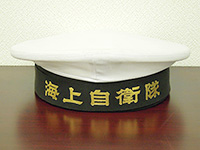 海士正帽海上自衛隊